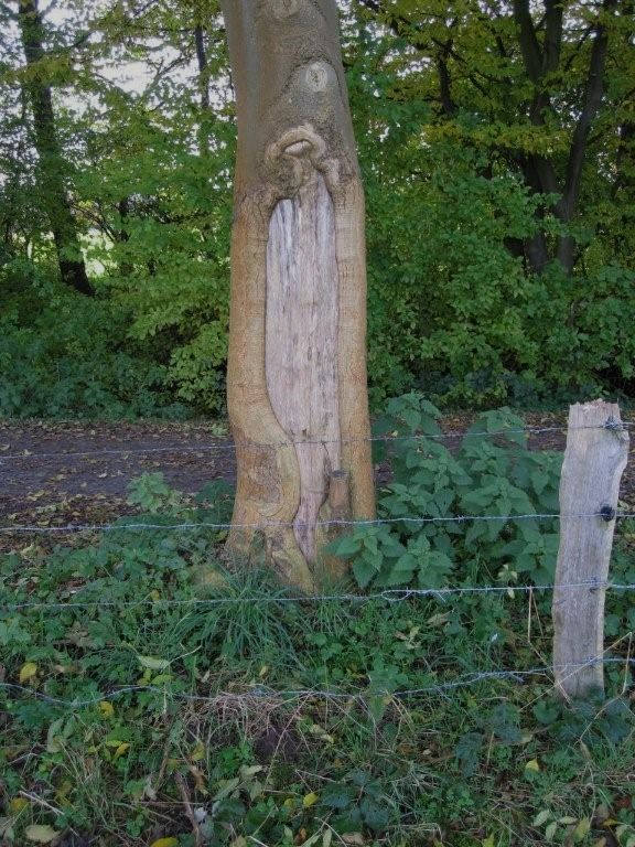 Von Pferden geschälte Esche.